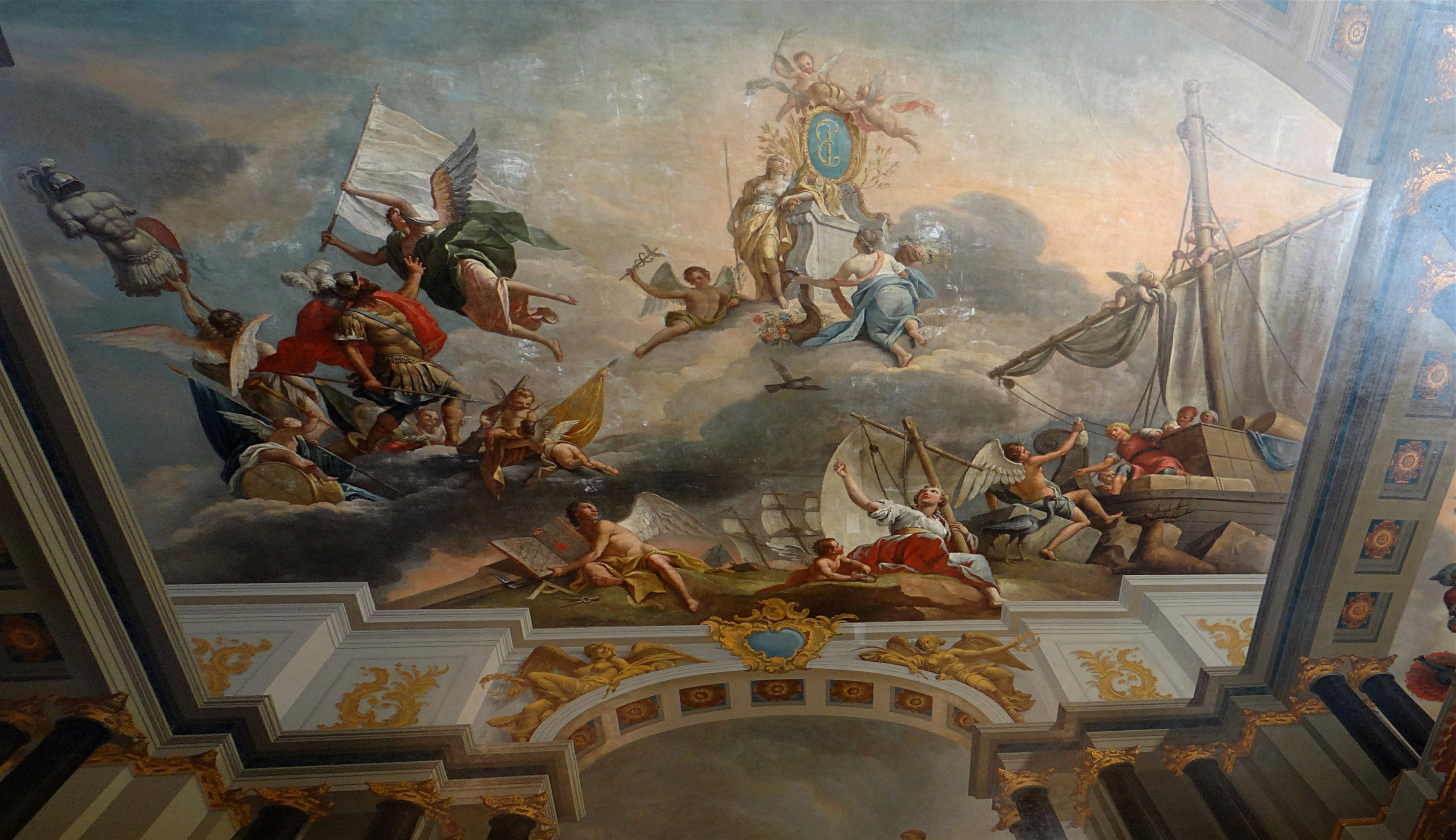 Plafond in Great Hall of Catherine Palace, Pouchkine, Russie.